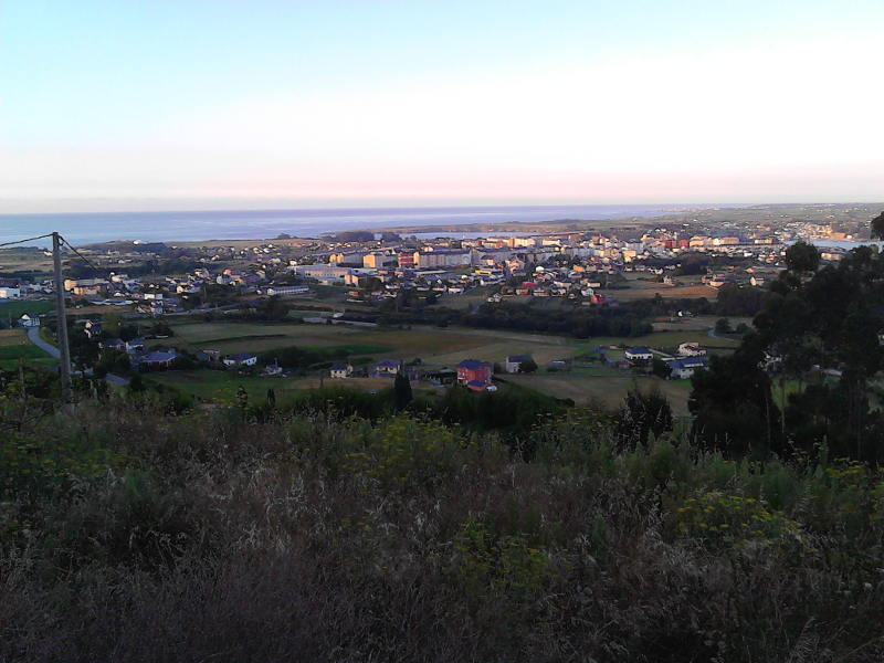 Vista de Ribadeo dende o Monte de Santa Cruz